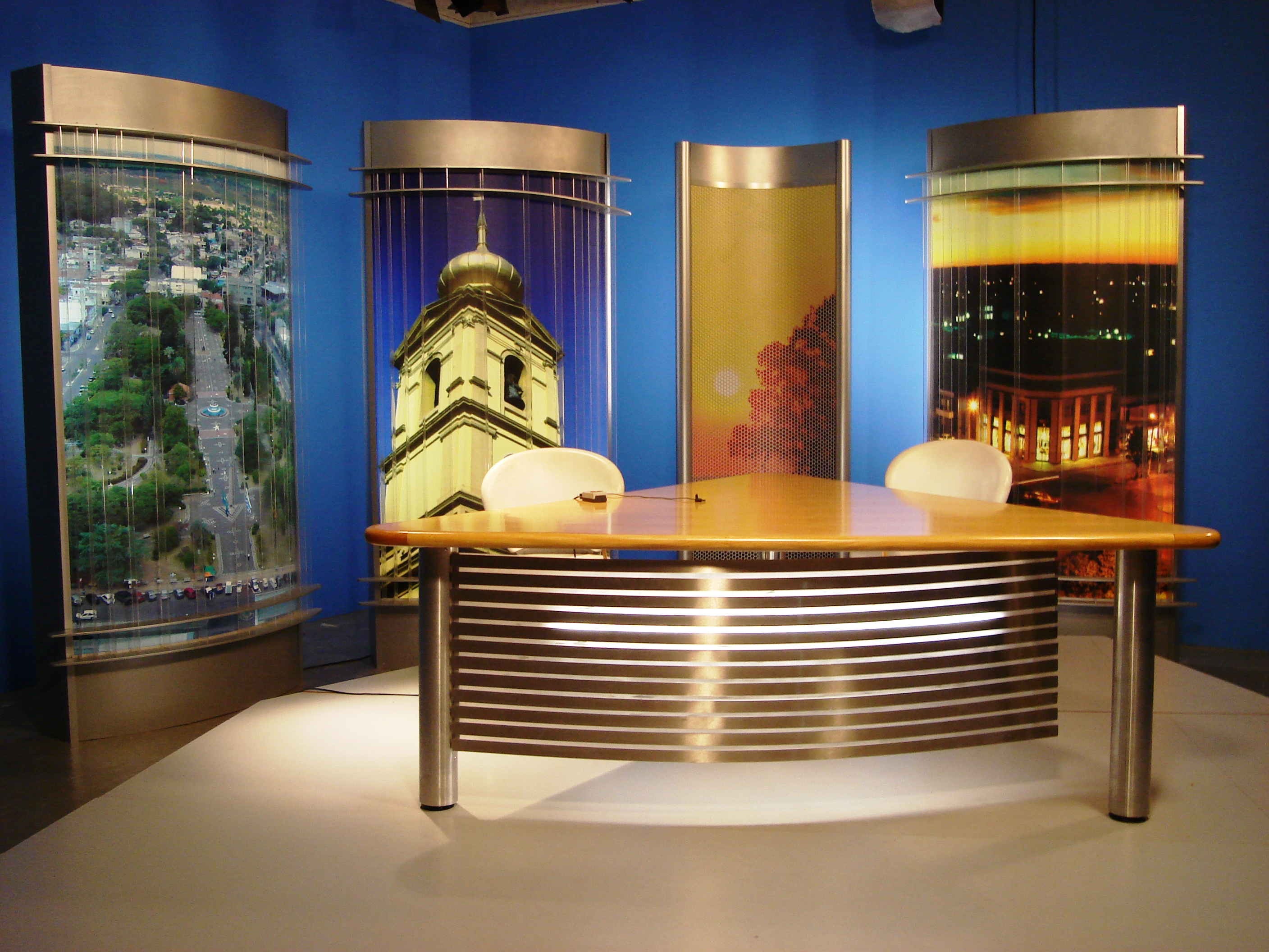 Estúdio da RBS TV Bagé.